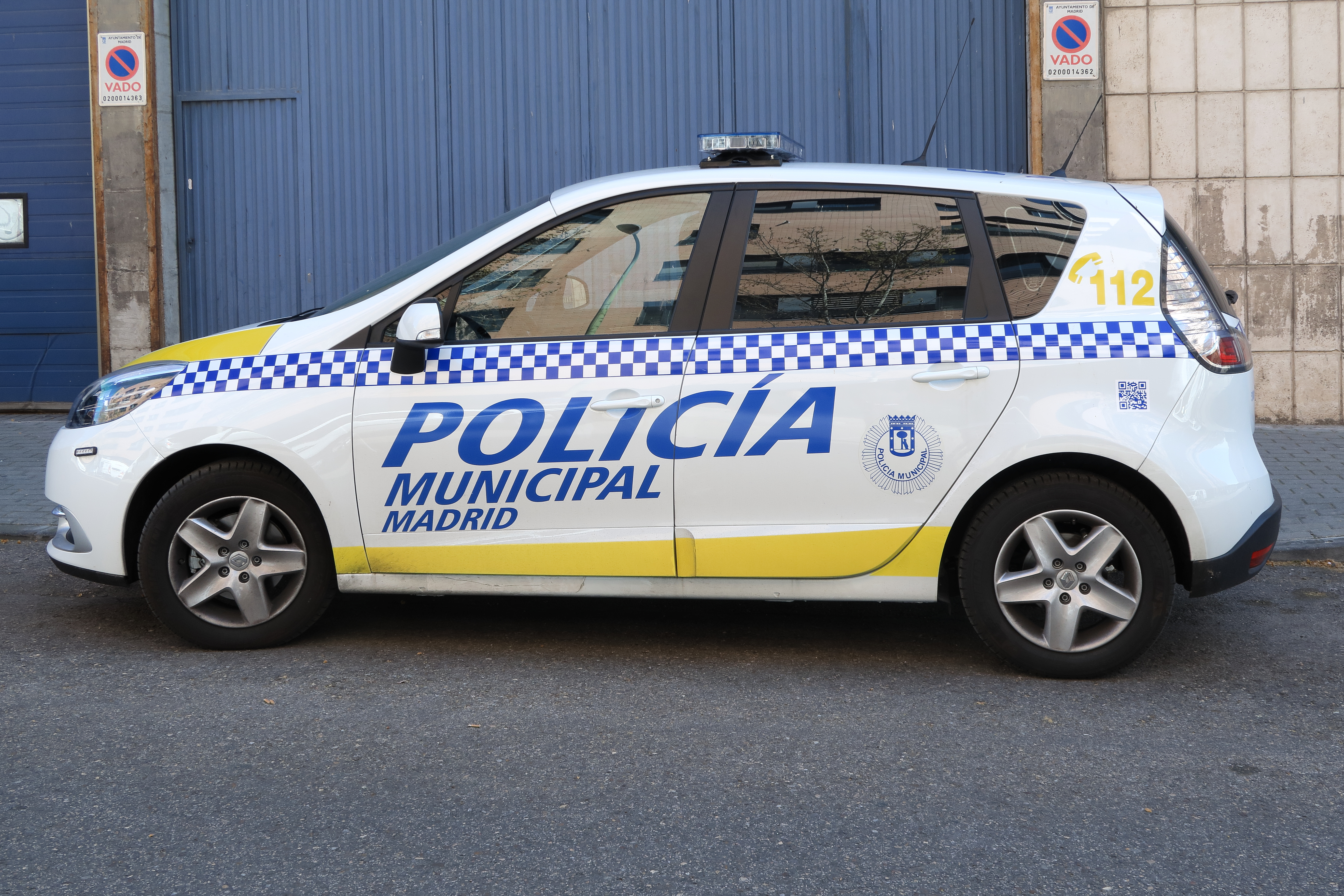 Renault Scenic, Policía Municipal de Madrid, nueva imagen 2016